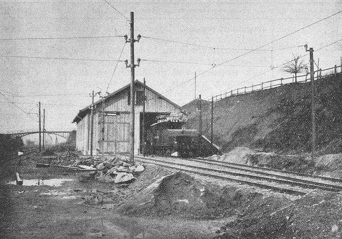 Versuchsbetrieb Seebach-Wettingen: Lokomotivschuppen im Bahnhof Seebach mit Maschine Nr. 1